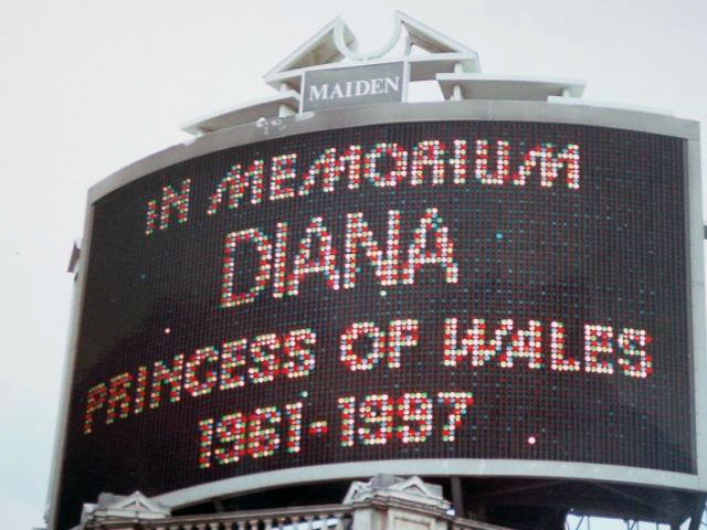 (c) Looi